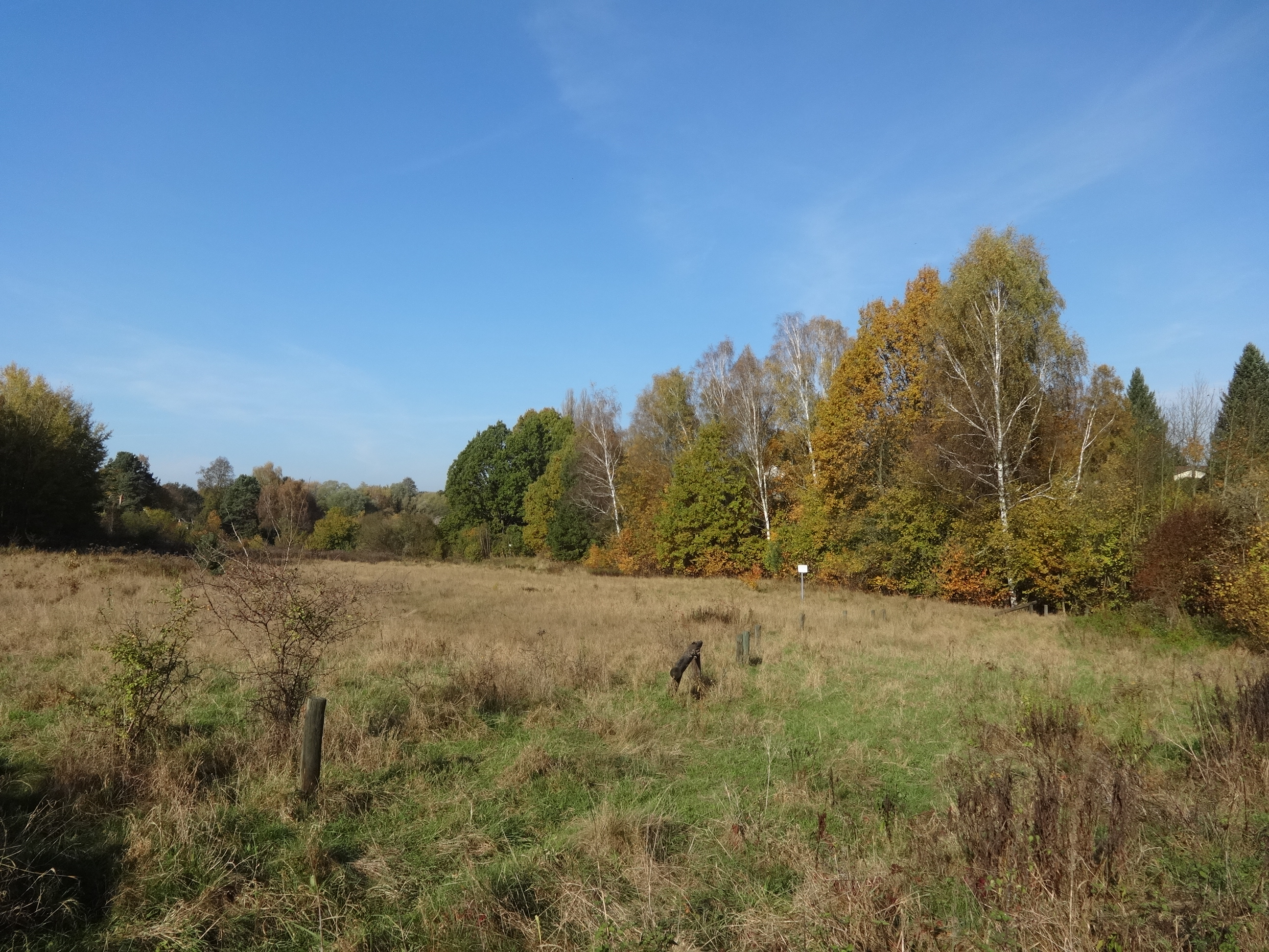 NSG Höllengrund-Pulverberg im Landkreis Dahme-Spreewald in Brandenburg. Das 48 Hektar große Naturschutzgebiet liegt zwischen Zeuthen und Wildau und entstand in der letzten Weichseleiszeit.